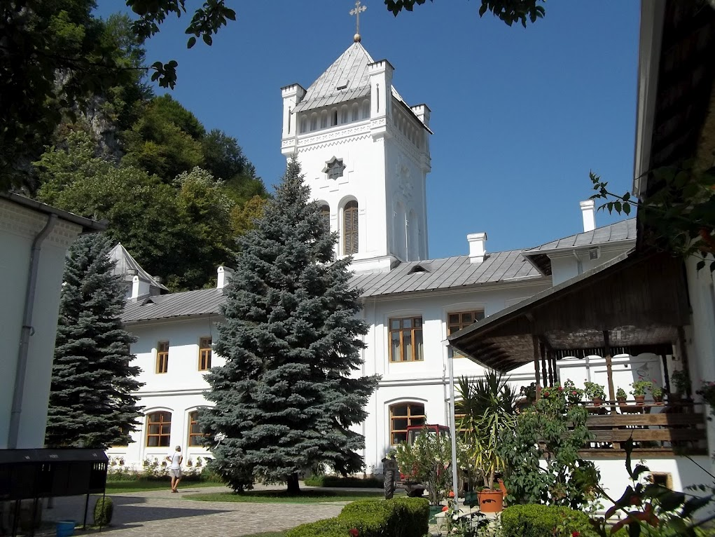 Stăreție 04